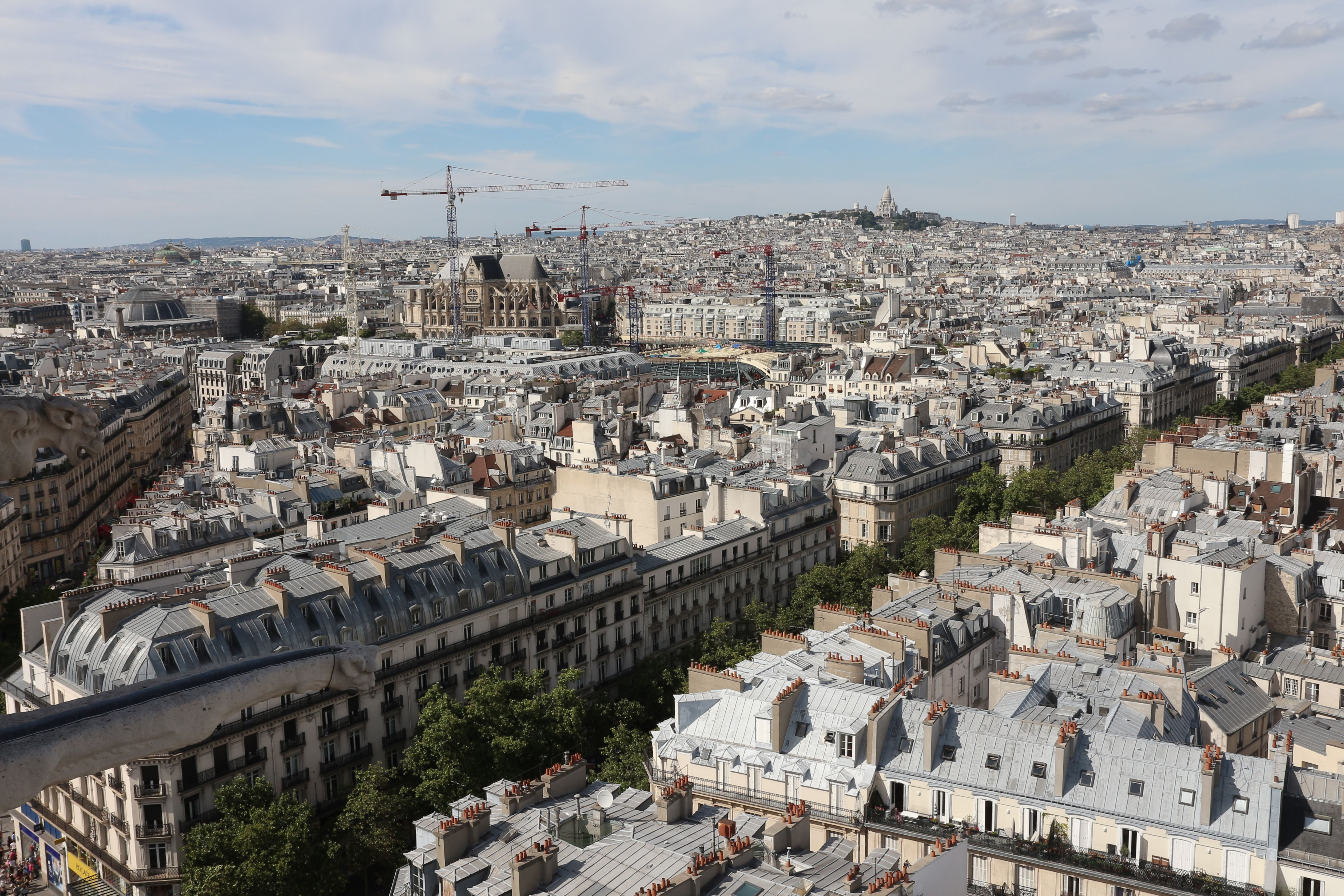 Le boulevard de Sébastopol vu depuis le sommet de la tour Saint-Jacques ainsi que le Forum des Halles en chantier (Canopée), l'église Saint-Eustache et la basilique du Sacré-Coeur